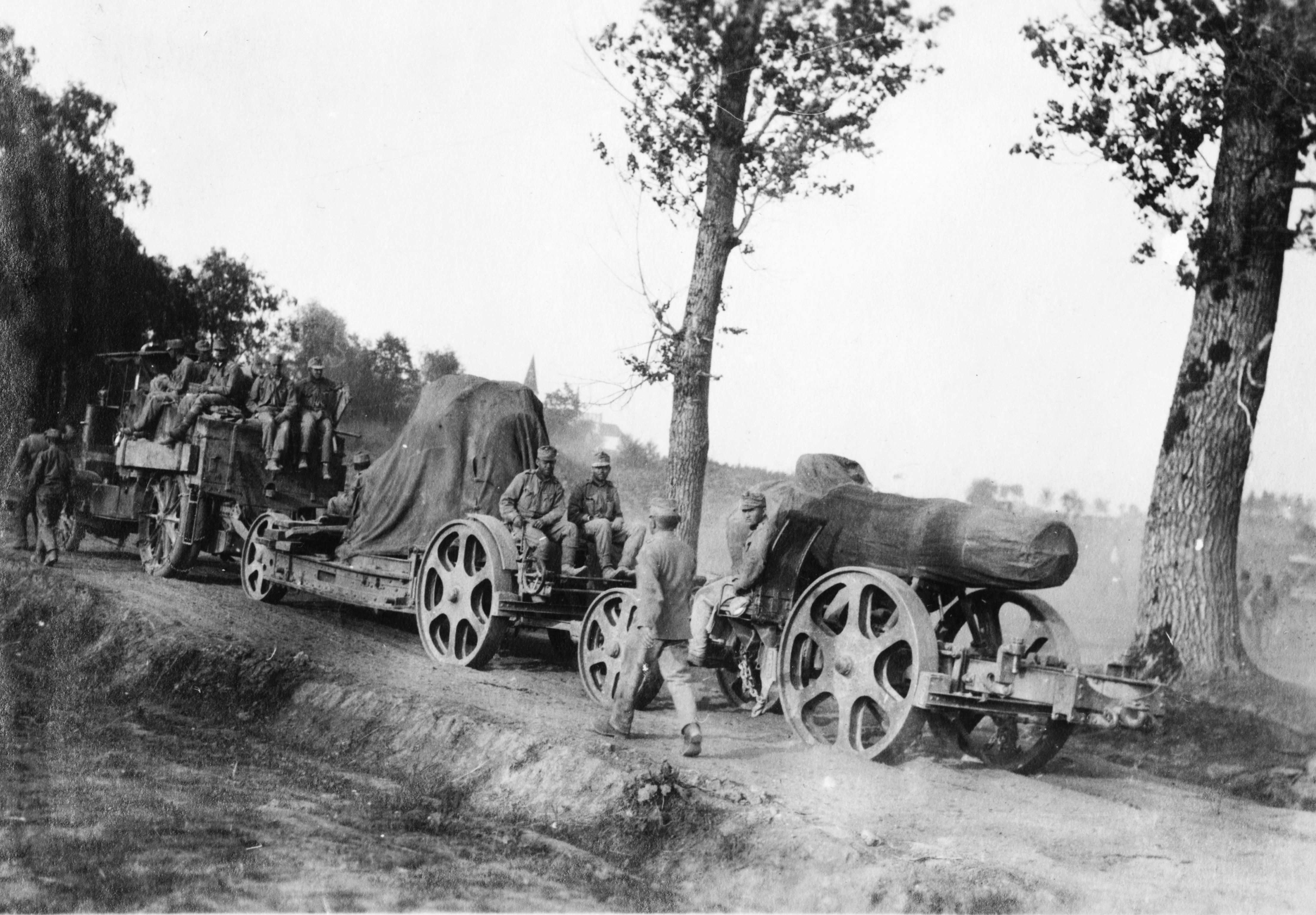 Skoda 30,5 Mörser mozsárágyú. Tags: Austro-Daimler-brand, tow truck, cannon, artillery, ordnance, First World War, Czechoslovak brand, Skoda-brand, soldier Title: Skoda 30,5 Mörser mozsárágyú.